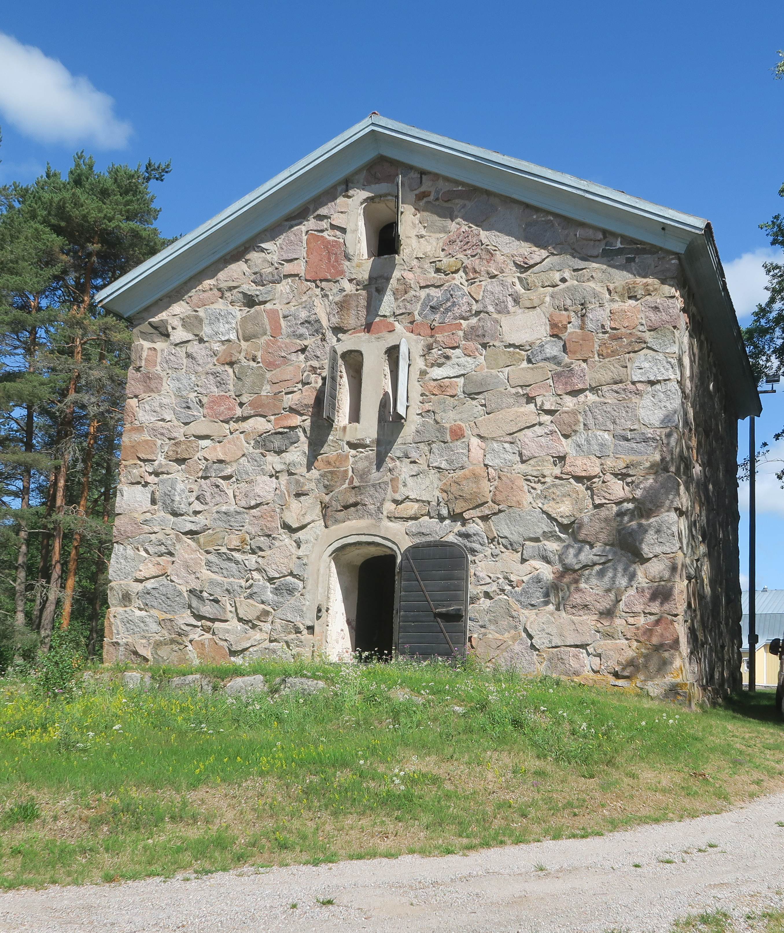 Perttelin kotiseutumuseo, Pertteli, Salo, Mikolantie 11. Museo toimii entisessä lainamaksiinissa.